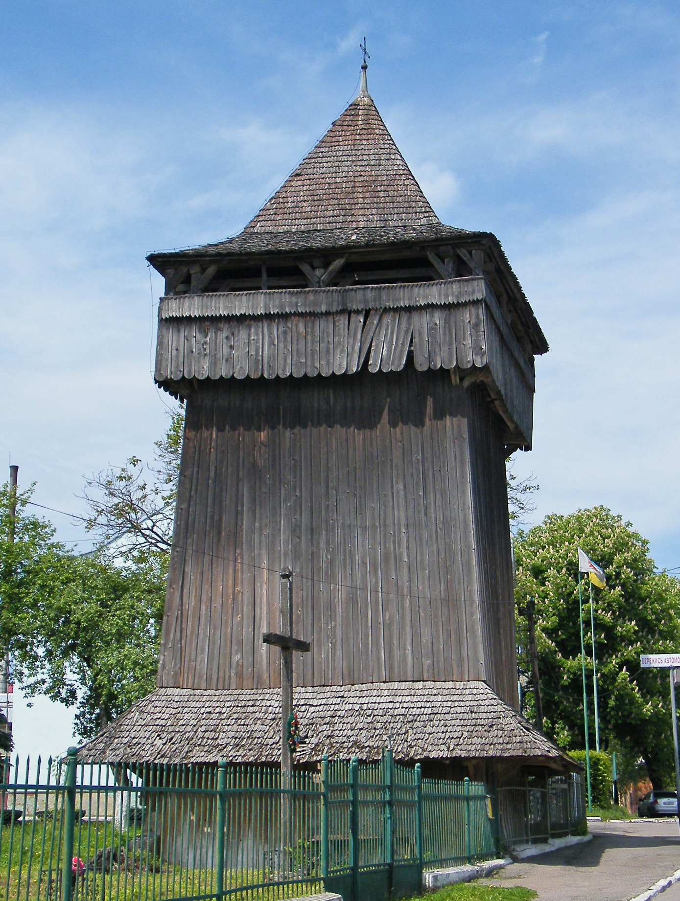 Колокольня церкви Воздвижения Честного Креста